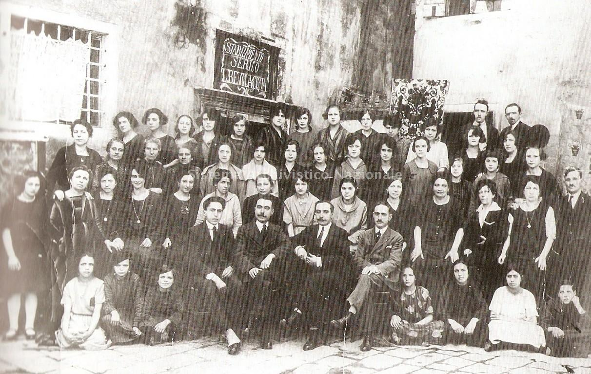 I fratelli Bevilacqua, titolari dell'omonima manifattura tessile, posano con le maestranze della ditta, Venezia 1923